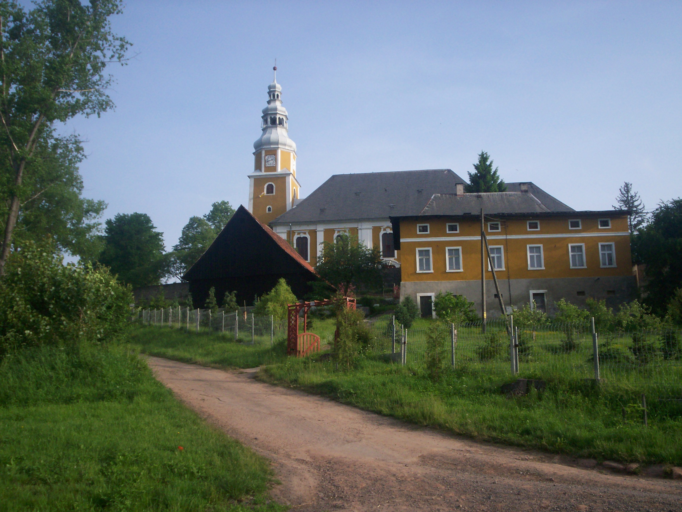 Pławna Dolna, kościół pw. “Świętej Tekli”